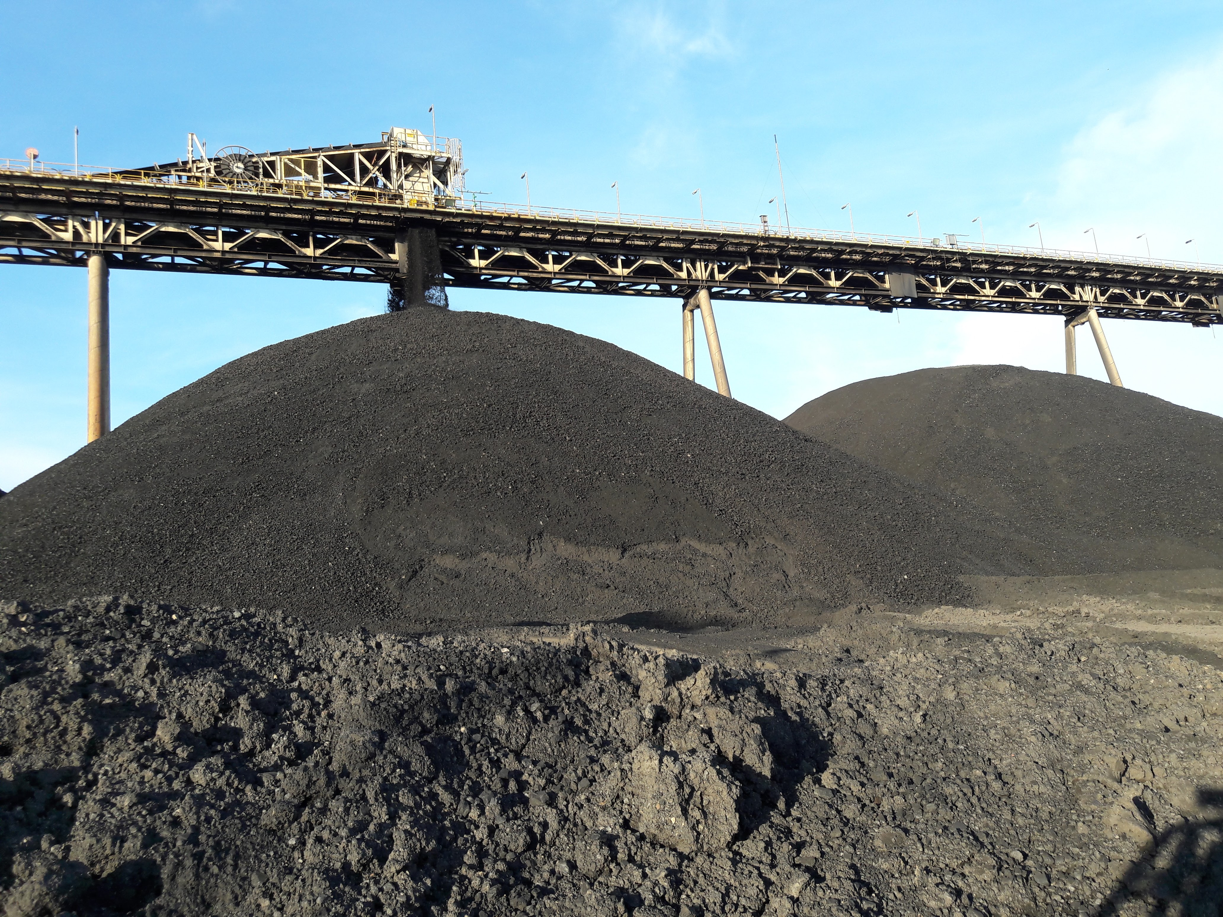 Coal Mining in East Kutai, East Kalimantan